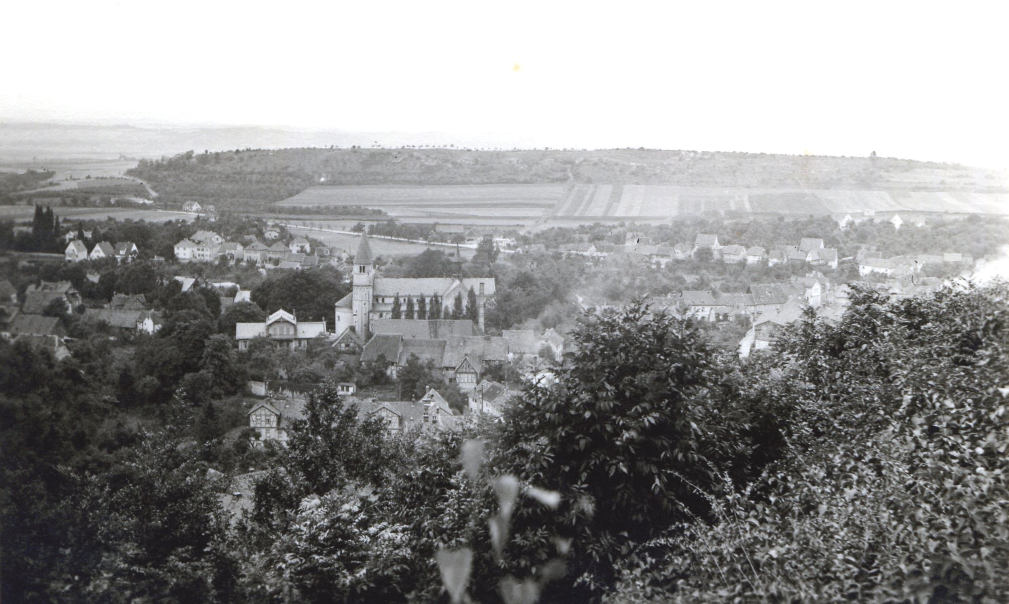 Blick vom westlichen Ende der Terrasse des Hotels Stubenberghaus auf Gernrode, August 1940